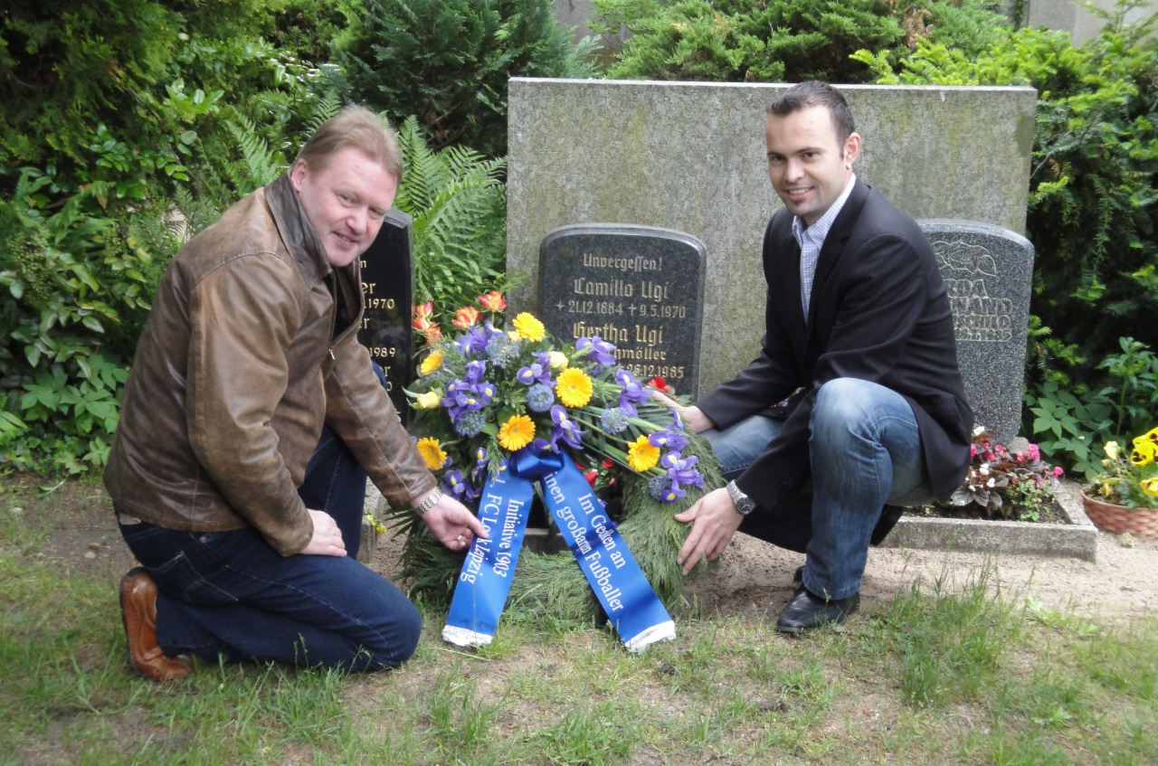 Durch die Initiative 1903 niedergelegter Kranz